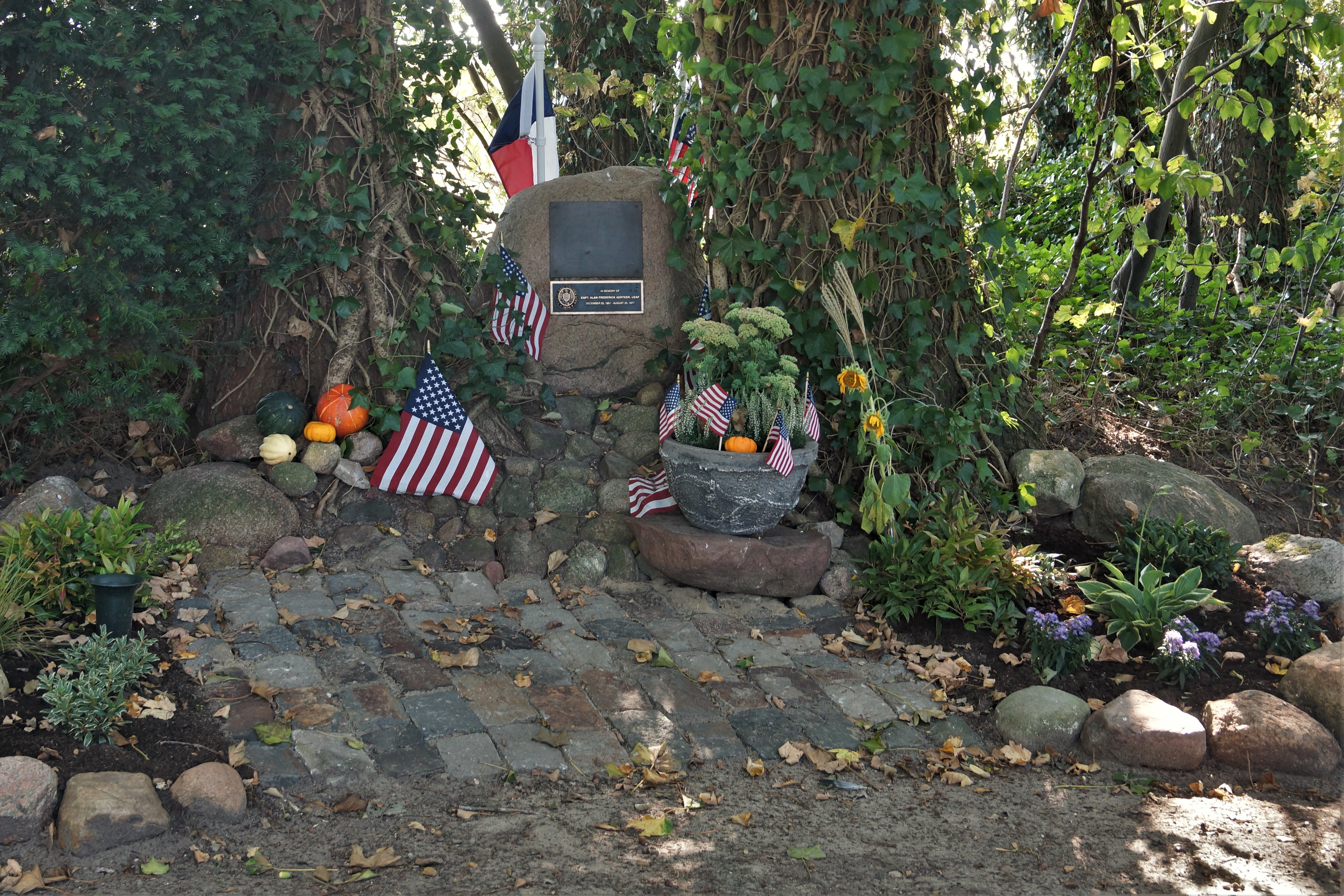 Denkmal Absturz Phantom in Thuine